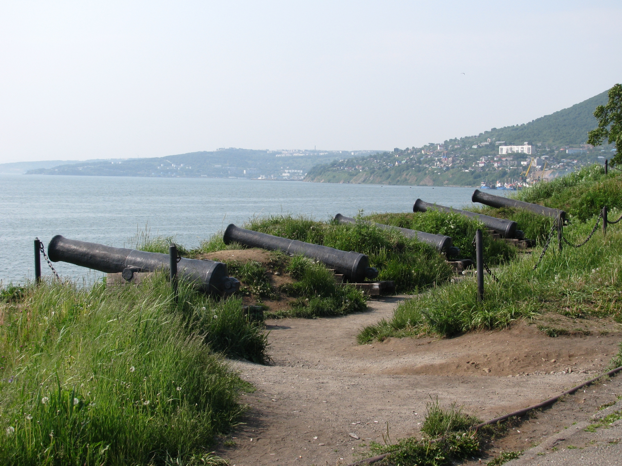 памятник Обороне Петропавловска-Камчатского в 1854 году, установленный на Никольской сопке